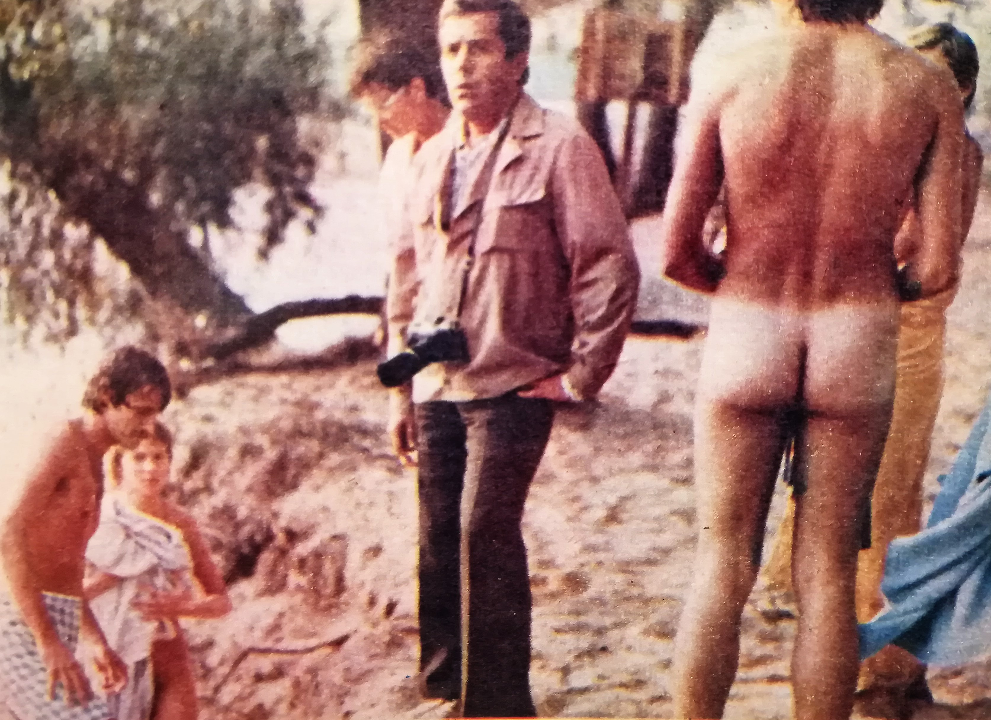 Plan filmu "Barwy ochronne" ze Zbigniewem Zapasiewiczem.